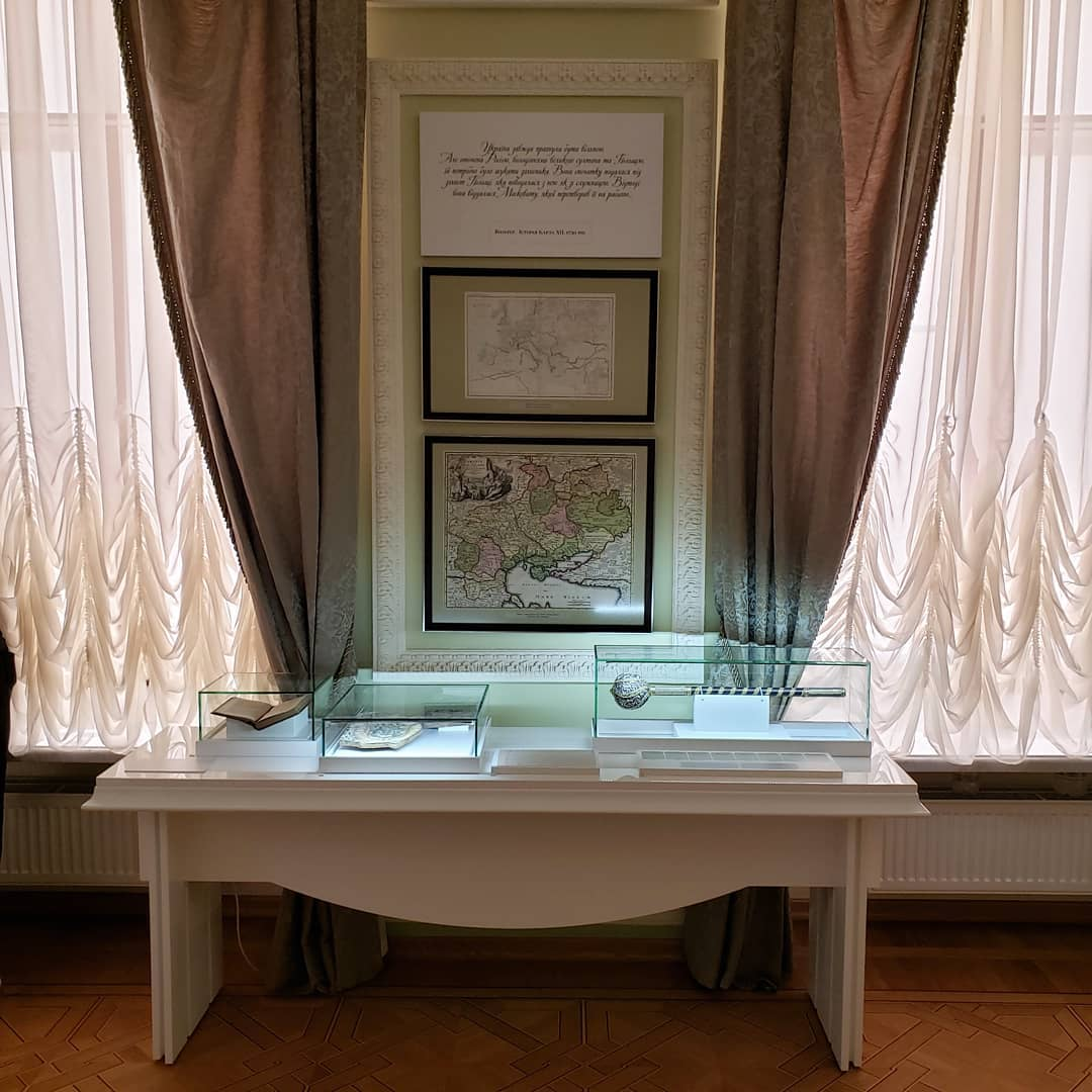 Фрагмент виставки у палаці Розумовського Григорій Орлик Повернення на Батьківщину